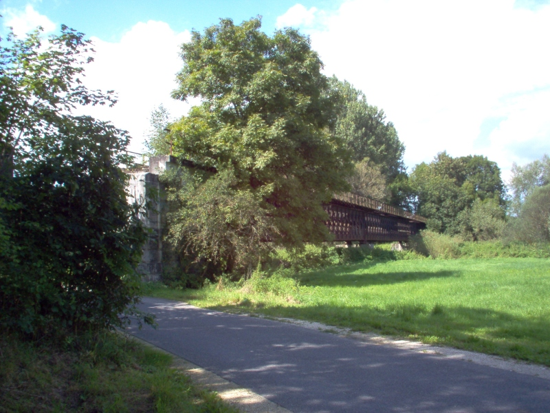 former train bridge between Sigmaringendorf and Sigmaringen